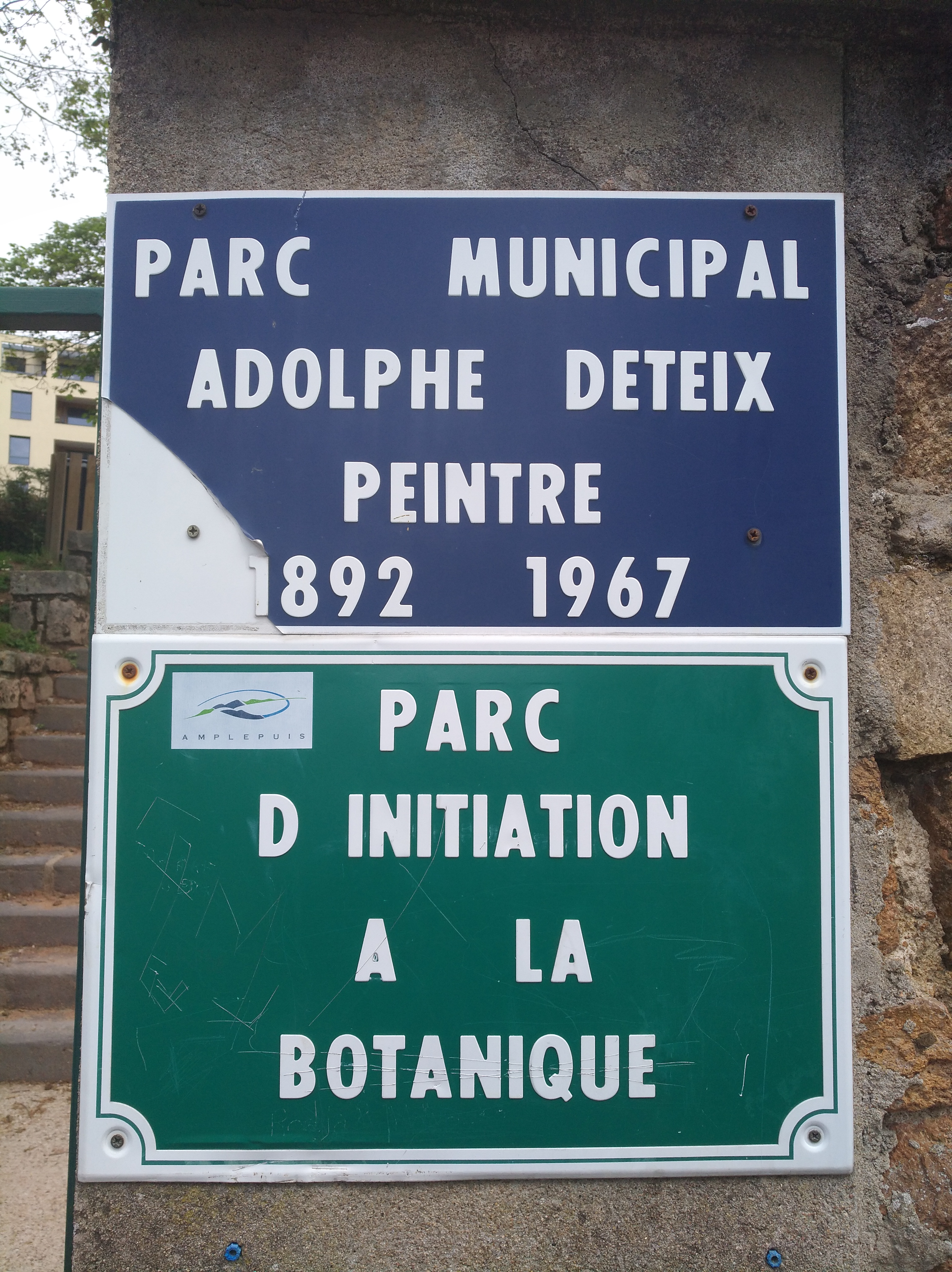 Plaque du parc municipal Adolphe Deteix, à Amplepuis (Rhône, France).